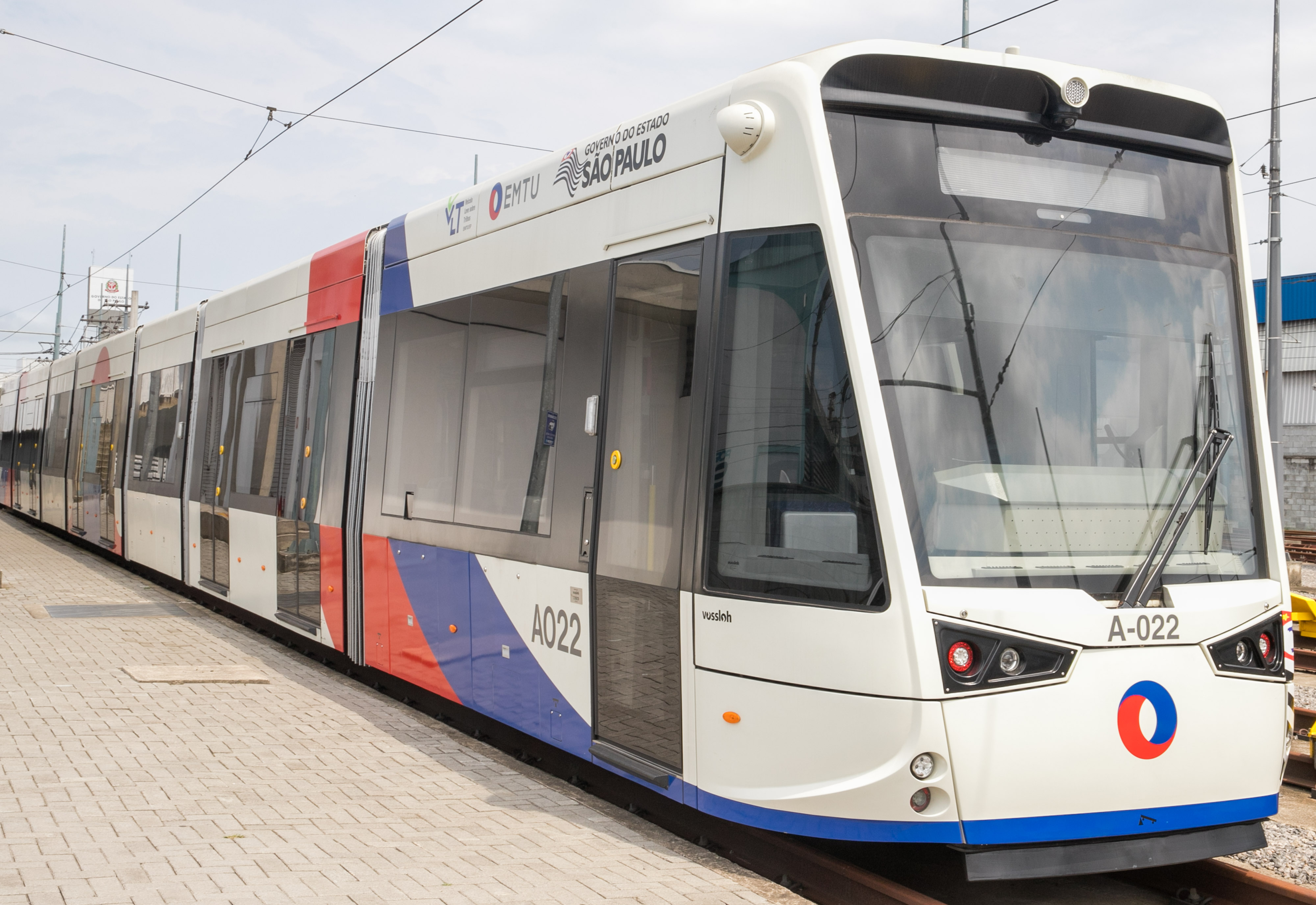 galeria20